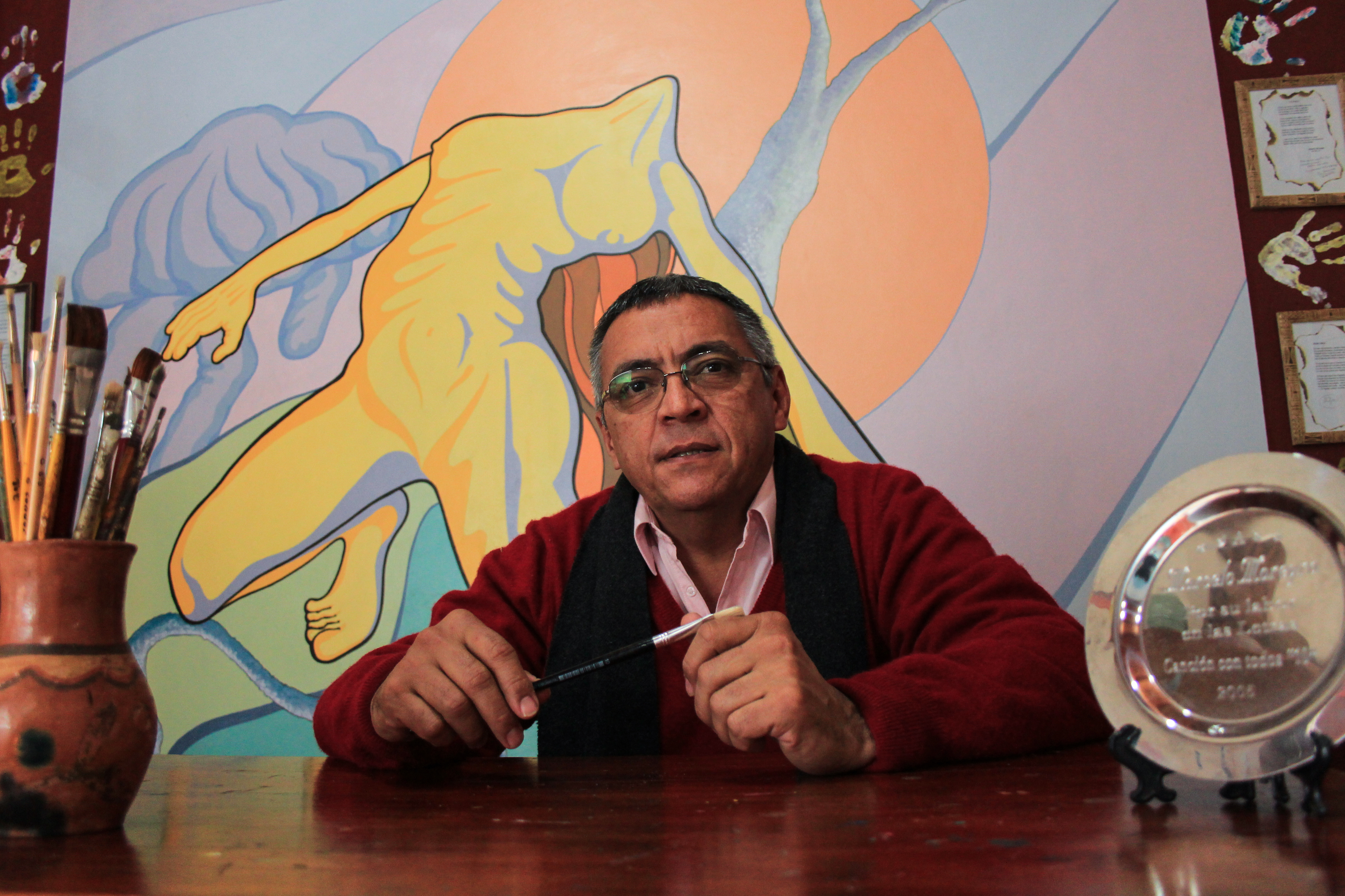 Marcelo Moreyra (n. el 1 de noviembre de 1958 en Tobuna, una localidad argentina ubicada en el departamento San Pedro de la Provincia de Misiones) es un escritor argentino y uno de los referentes más conocidos de la literatura misionera. Moreyra es poeta, pintor, muralista, locutor, docente y fotógrafo. Estudió dibujo, pintura, cerámica, escultura y grabado en la Escuela Municipal de Artes de Iguazú con el artista Floriano “Mandové” Pedrozo. Desde 1969 vive en Puerto Iguazú.